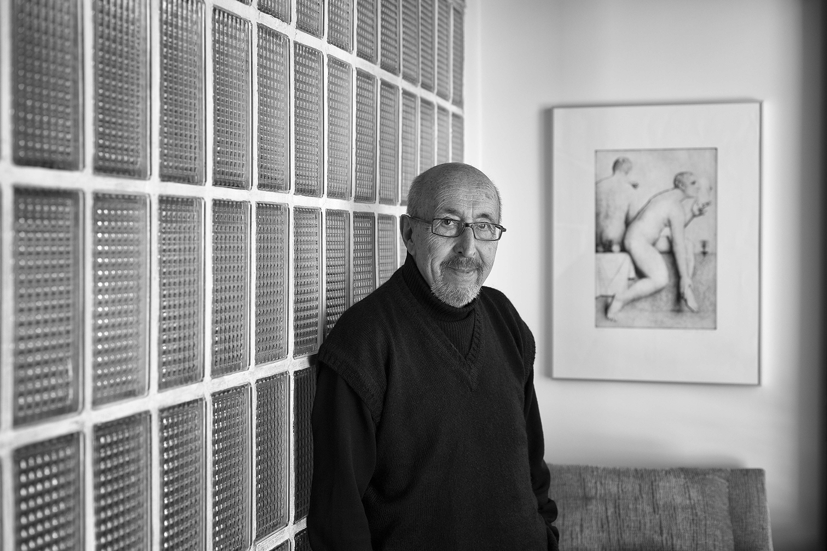 Manuel Juliar 2015